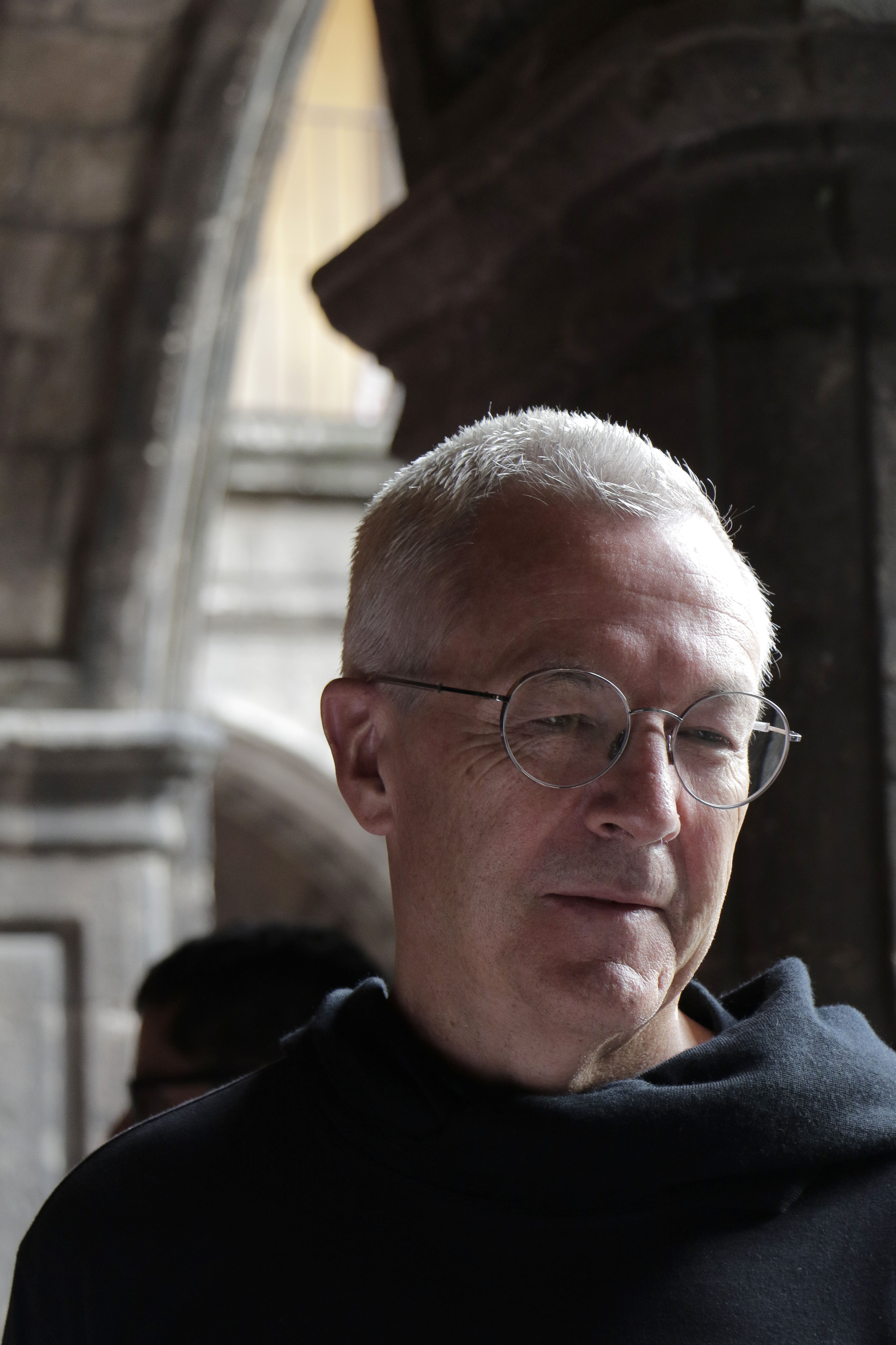 Martes 5 de junio de 2018. En el Antiguo Colegio de San Ildefonso, como parte de la exposición Valerio Olgiati: La idea de la arquitectura, (realizada para el festival de arquitectura y ciudad MEXTRÓPOLI 2018), se realizó un recorrido por la muestra a cargo del arquitecto suizo, posteriormente dio una conferencia en el Anfiteatro. La exposición está compuesta por 14 proyectos, de tipologías y escalas diversas. Fotografía: Tania Victoria/ Secretaría de Cultura CDMX.